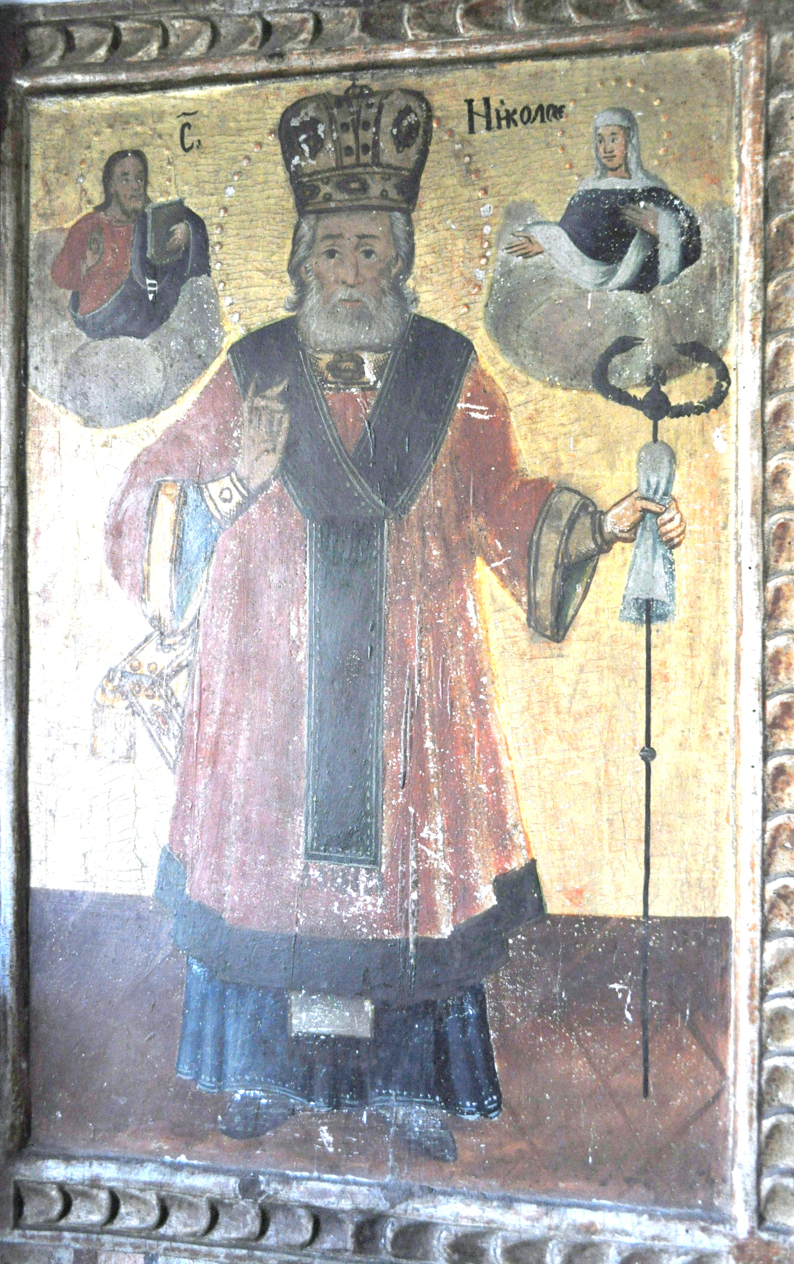 Biserica de lemn "Buna Vestire" din Ciungani, județul Hunedoara